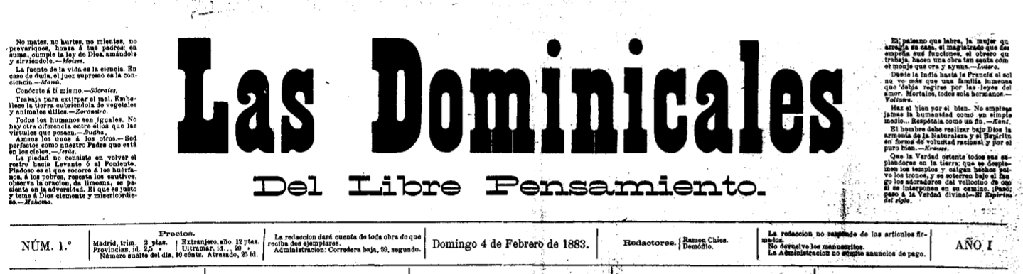 Primera página del primer número de Las Dominicales del Libre Pensamiento, 4 de febrero de 1883.